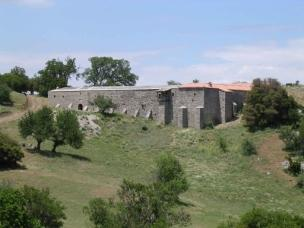 Ο ναό του Προφήτη Ηλία στο Ζέλι Φθιώτιδας